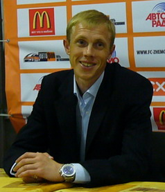 Олег Василенко 2009